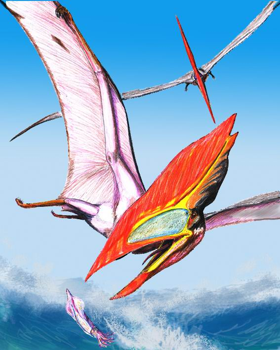 Thalassodomeus pair